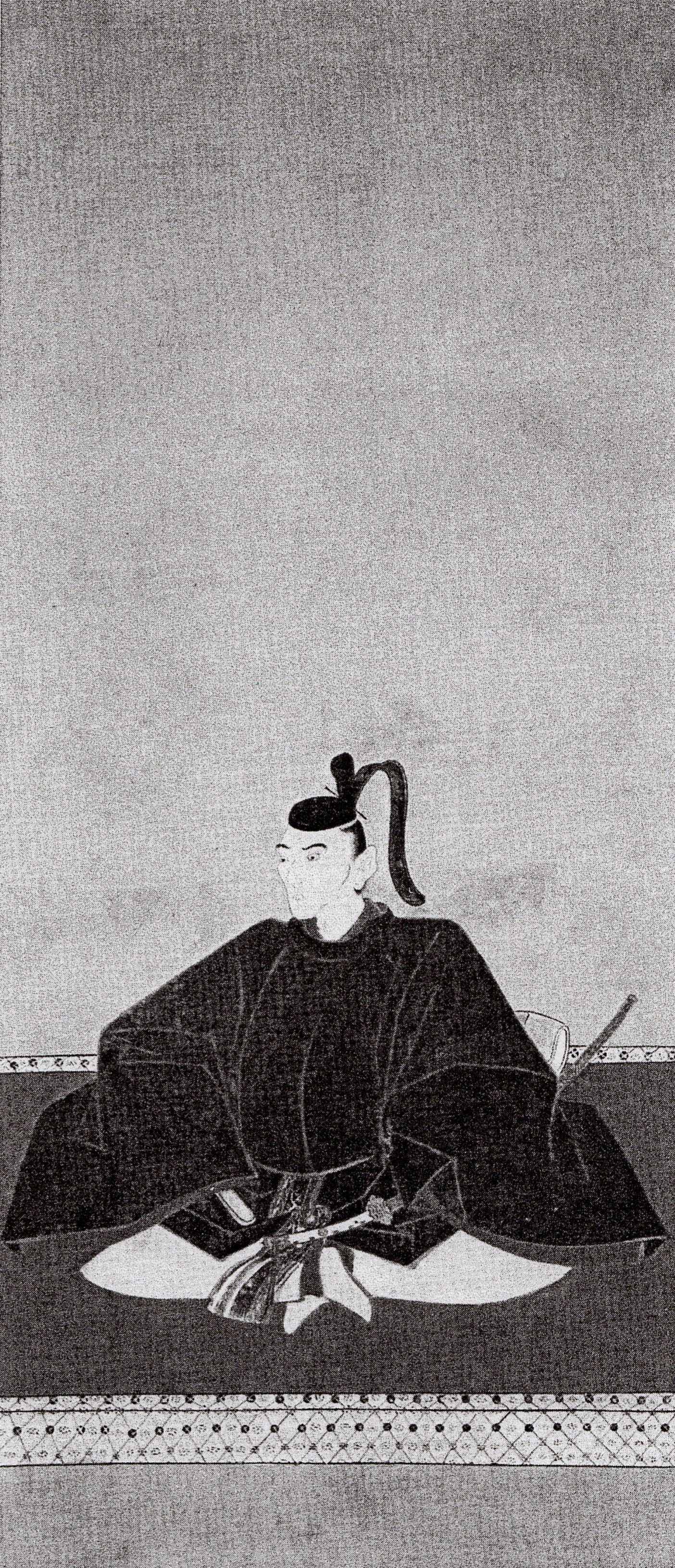 毛利元知の肖像(モノクロ)。